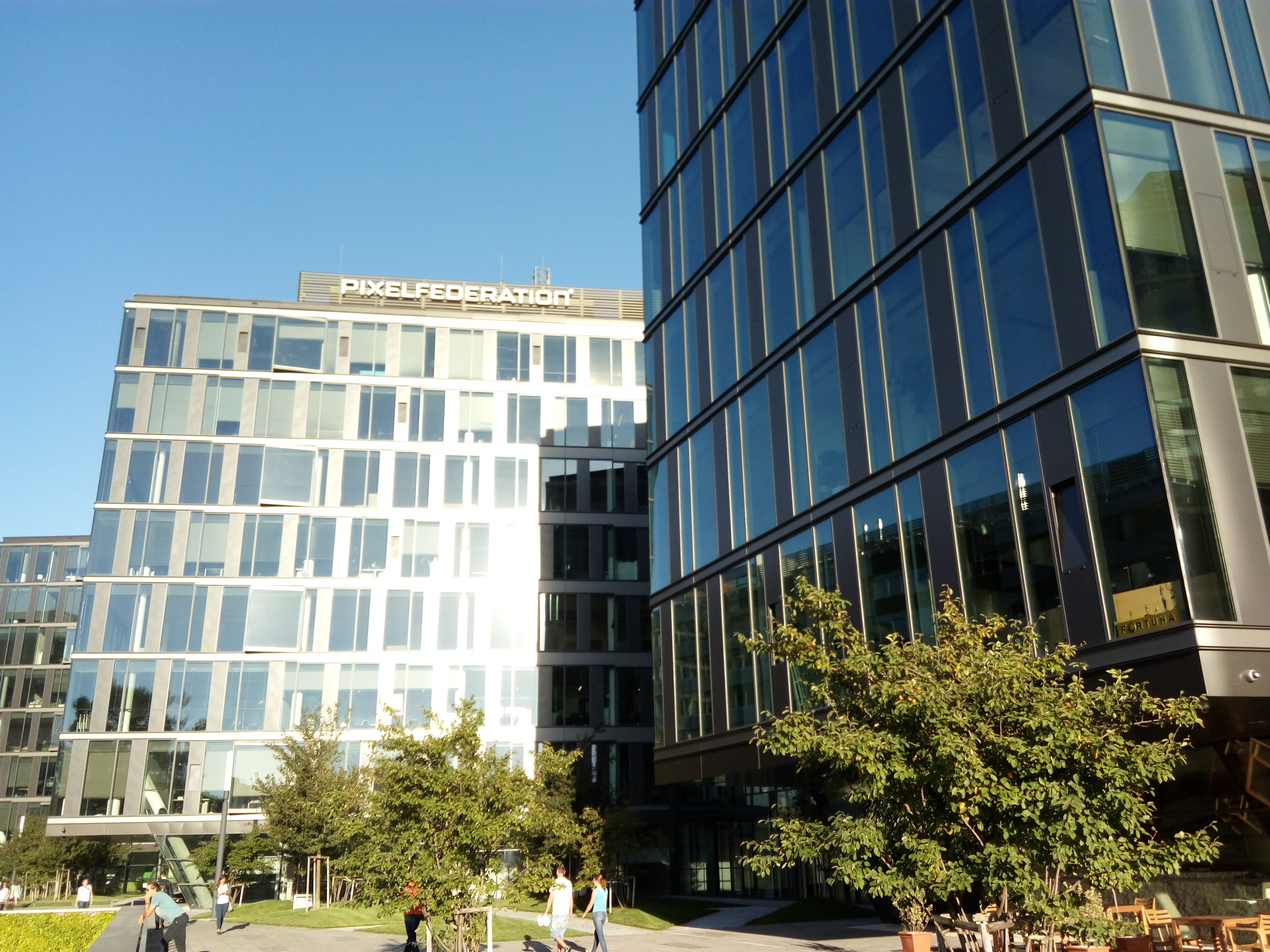 Digital Park, Einsteinova, Petržalka, Bratislava